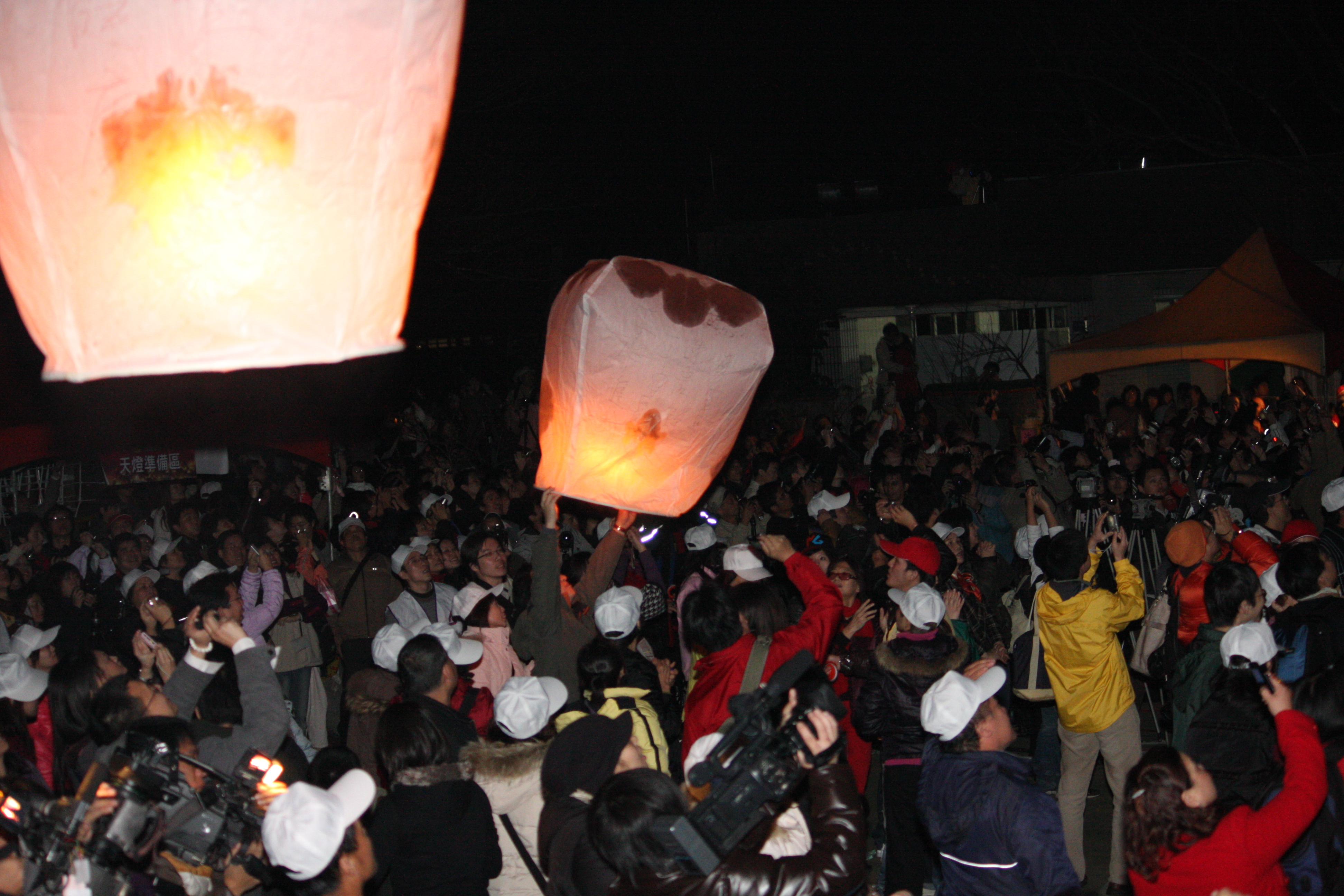 中文（台灣）: 平溪天燈節。